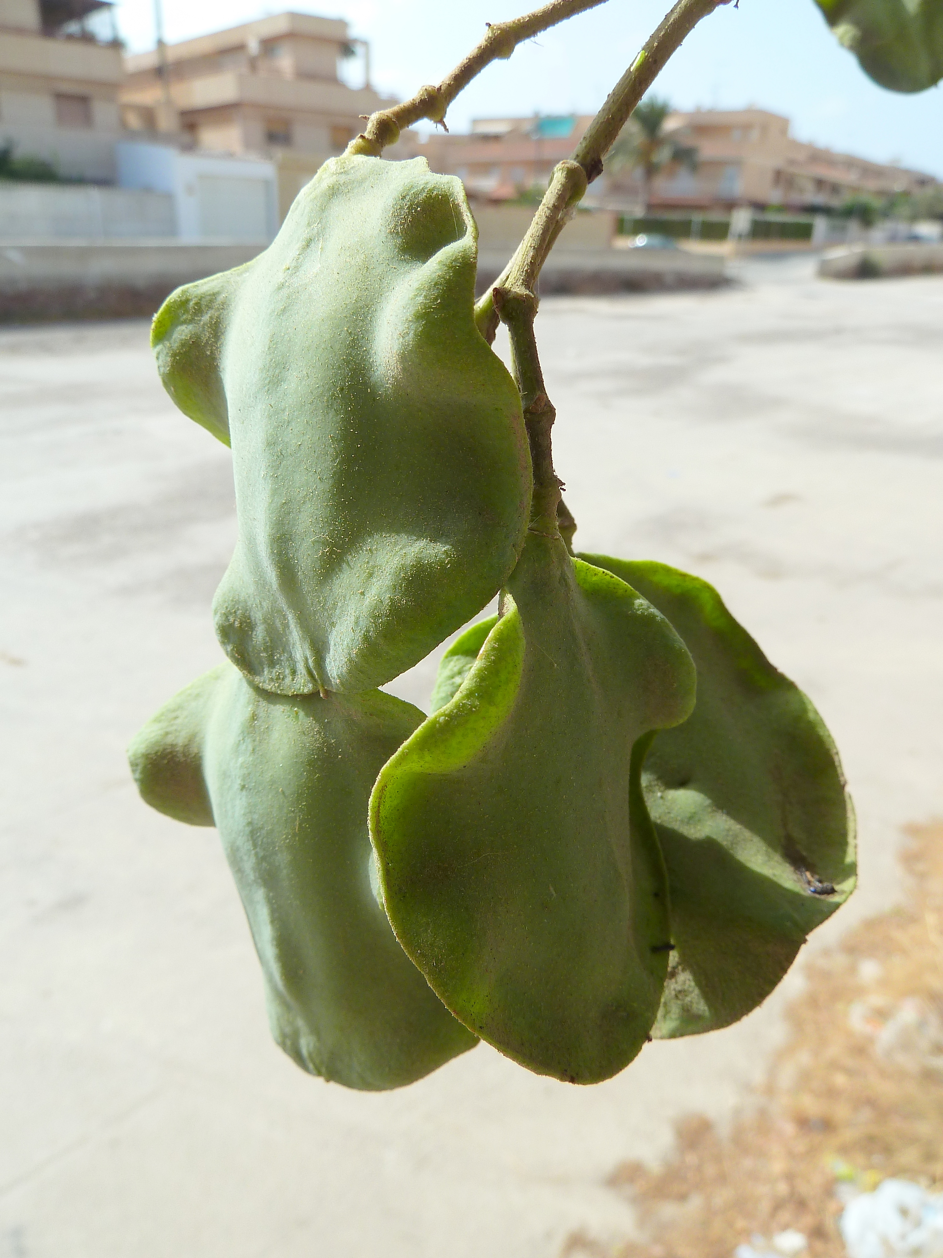 Jacaranda mimosifolia (Jacaranda, Tarco) - Frutos inmaduros - Cultivado/ornamental, c./ Antonio Salas, a lo largo de la Rambla del Charco, Águilas (Murcia, España).